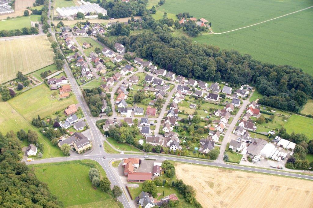 Luftbild von Bexterhagen